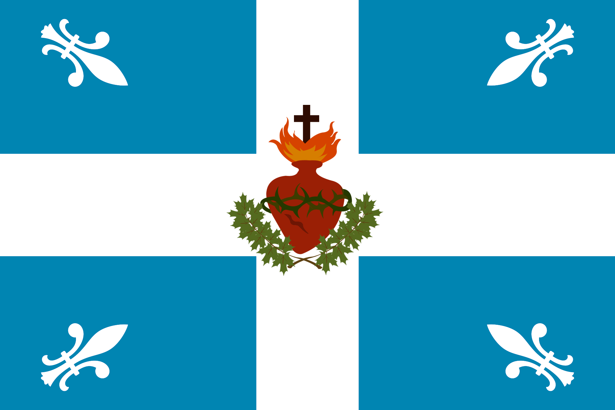 Drapeau du Carillon Sacré-Coeur